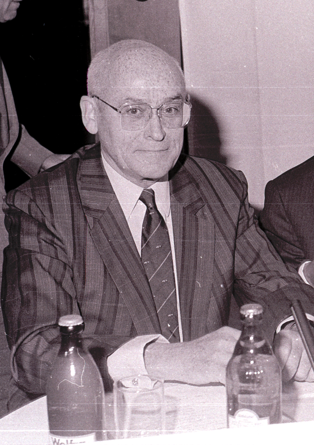 Otto Braun-Falco, Arzt und Dermatologe. Hier während des SZ-Gesundheitsforums am 12. Mai 1986 in München.